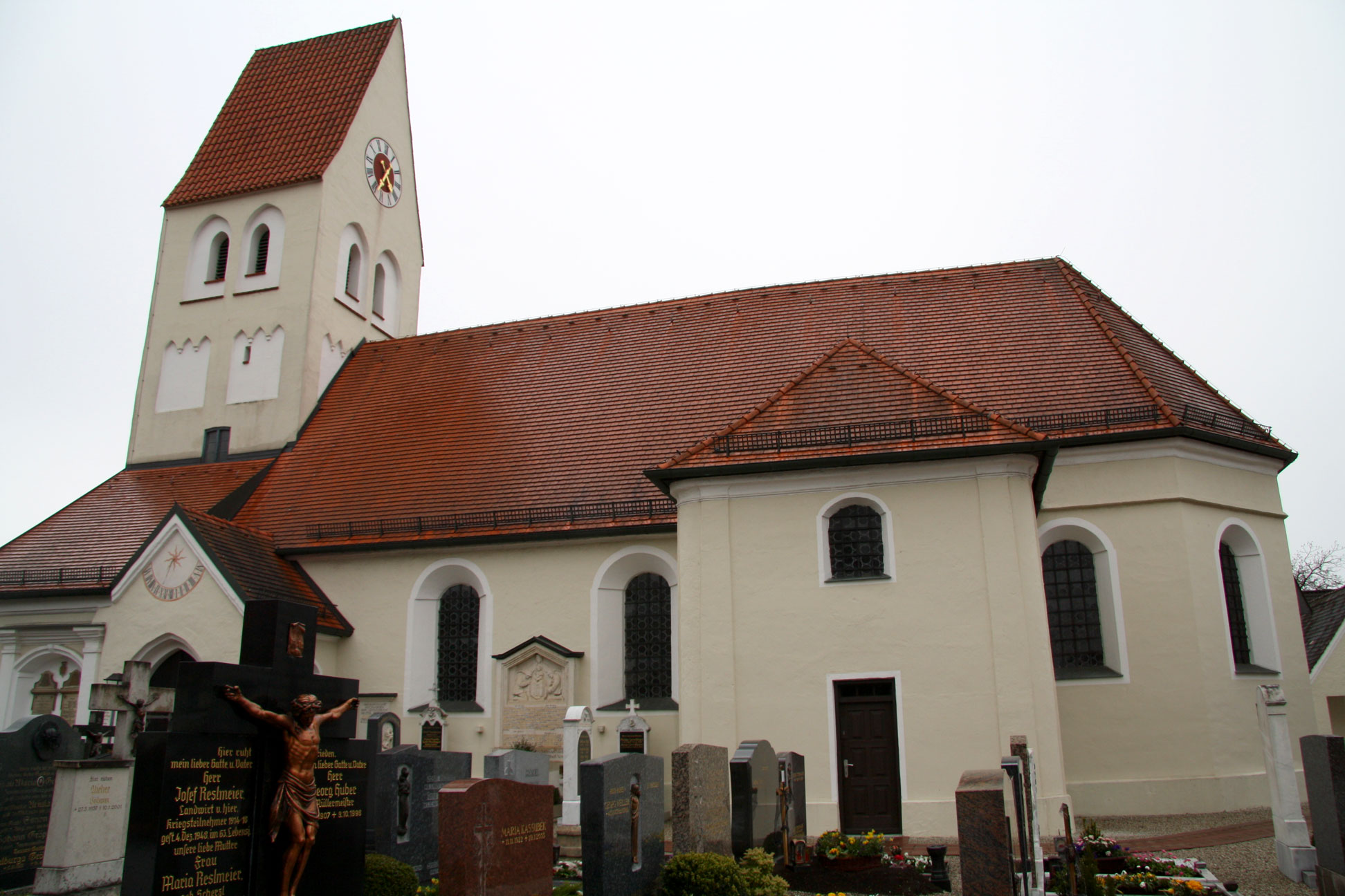 St. Nikolaus in Notzing von Süden